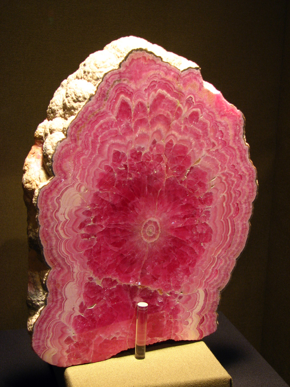 Ejemplar de rodocrosita, procedente de Capillitas, Catamarca, Argentina.